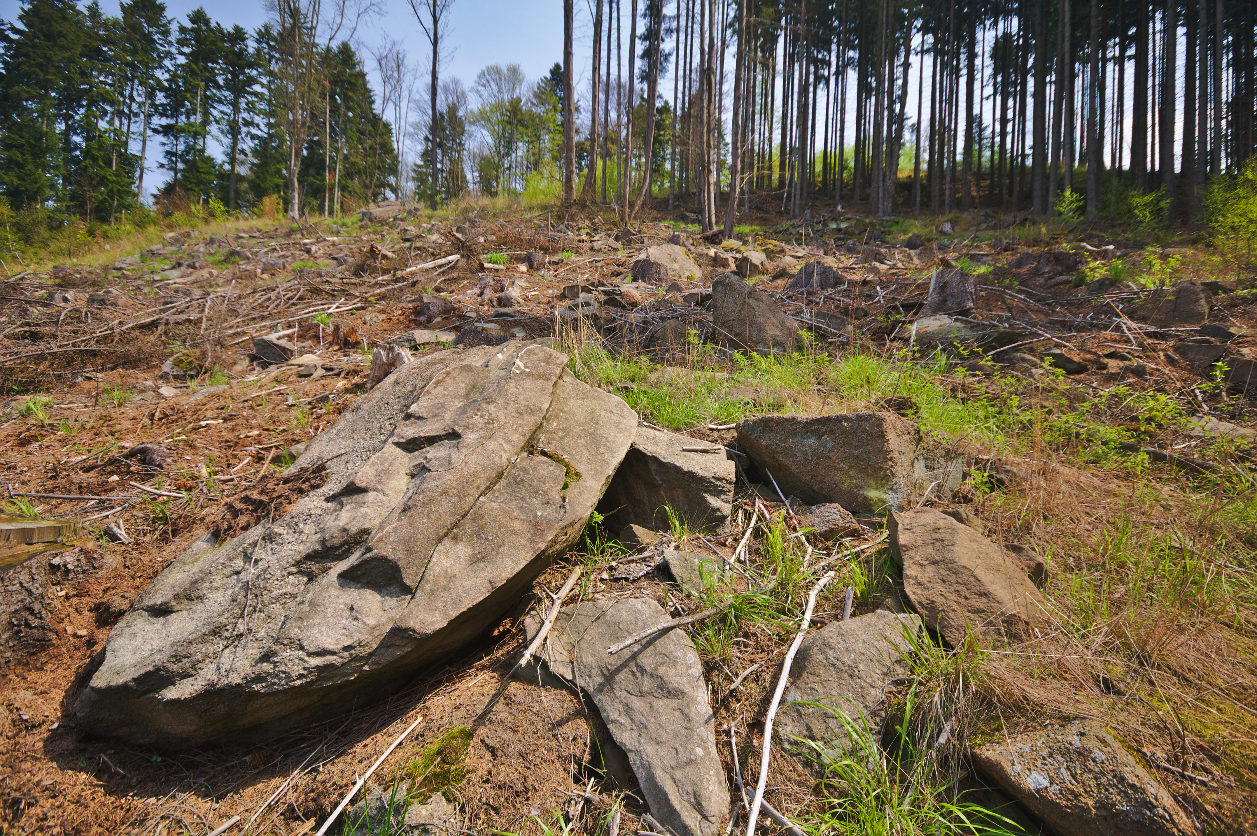 Přírodní památka Kamenné proudy u Domašova, okres Olomouc